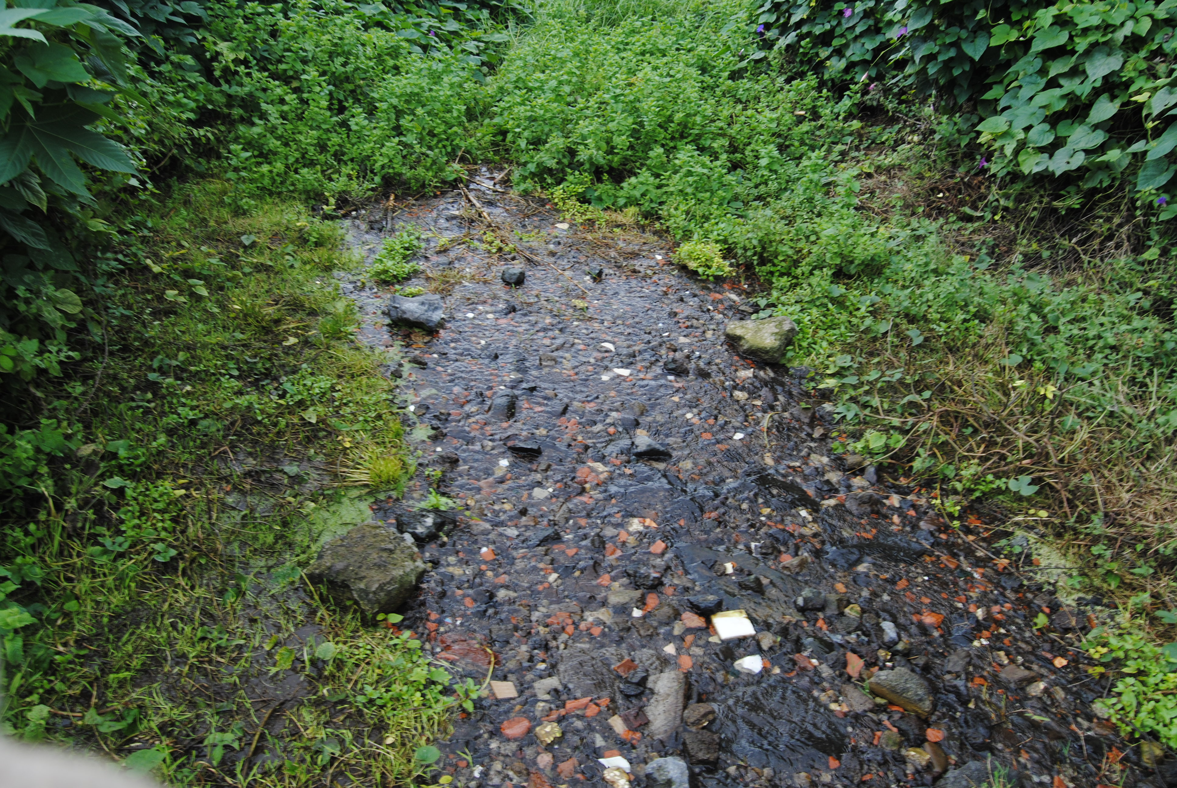 Sorgente d'acqua nella Timpa di Leucatia (Monte San Paolillo) versante di Sant'Agata li Battiati.